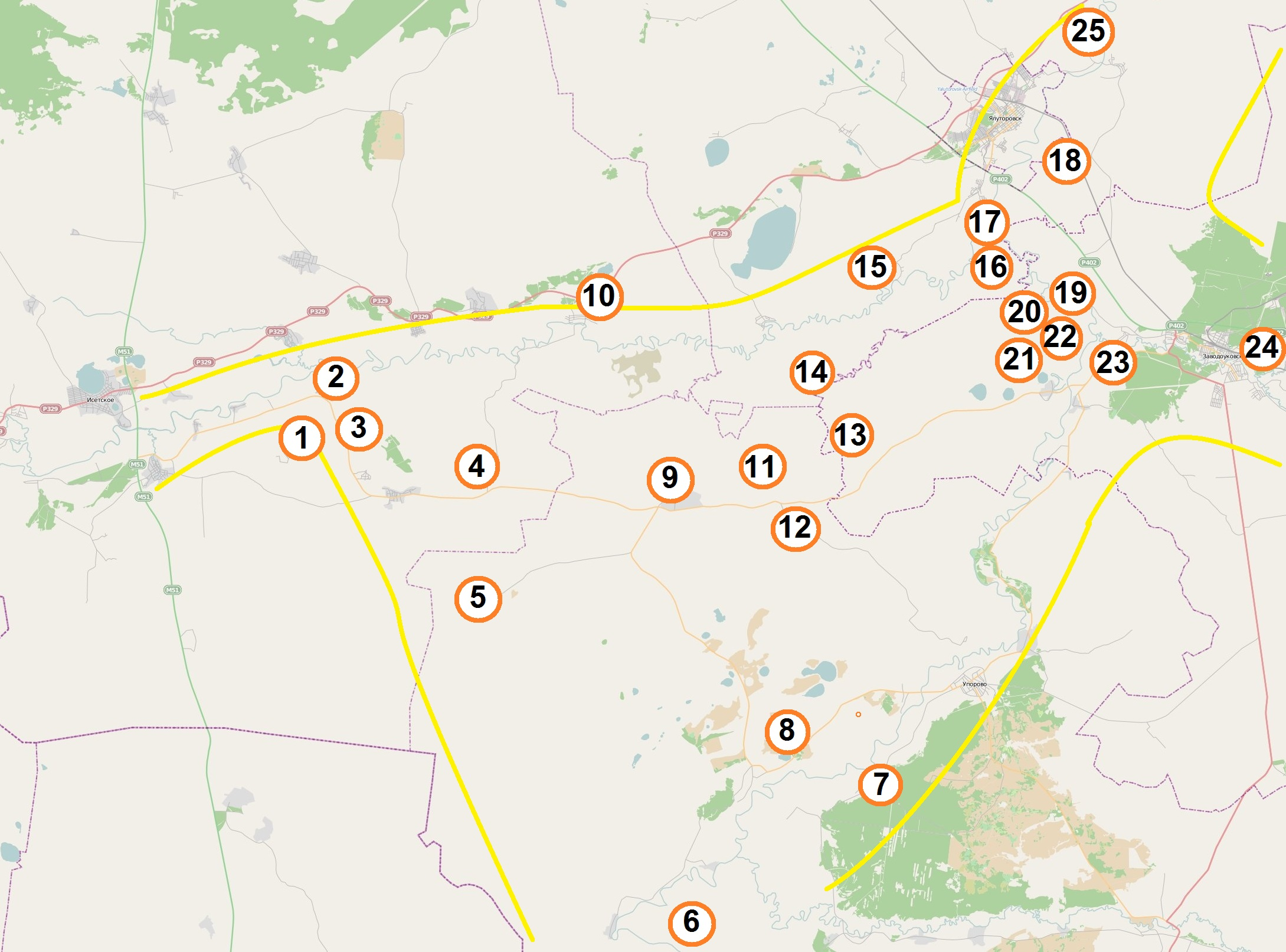 Приблизительная схема Ингальской долины, создана на основе OpenStreetMap, Схематического плана археологического микрорайона Ингальская долина и книги Волков Е. Н. Комплекс археологических памятников Ингальская долина. — Новосибирск: Наука, 2007. — 224 с. — 500 экз. — ISBN 978-5-02-031090-2. Цифрами обозначены: 1 - Марьино ущелье, 2 - Красногорский археотоп (Хрипуновский могильник, Лизуново городище), 3 – Коловский, 4 – Верхне-Ингальский Борок, 5 – Липихинское, 6 – Боровушки, 7 – Скородум, 8 – Тютринский могильник , 9 – Ингалинское, 10 – Слободо-Бешкильское городище, 11 – Нижнеингалинское, 12 – Пушкарёво, 13 – Ак-Паш, 14 – Сазык, 15 – Сосновка, 16 – Остров, 17 – Бузан, 18 – Имбиряй, 19 – Устюг, 20 – Щетково, 21 – Старо-Лыбаево, 22 – Двухозёрное, 23 – Гилёва, 24 – Ук, 25 - Хохловский курган. This map may be incomplete, and may contain errors. Don't rely solely on it for navigation.